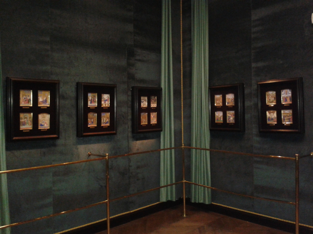 Cinq vitrines présentant les miniatures découpées des Heures d'Etienne Chevalier dans le Santuario du château de Chantilly.